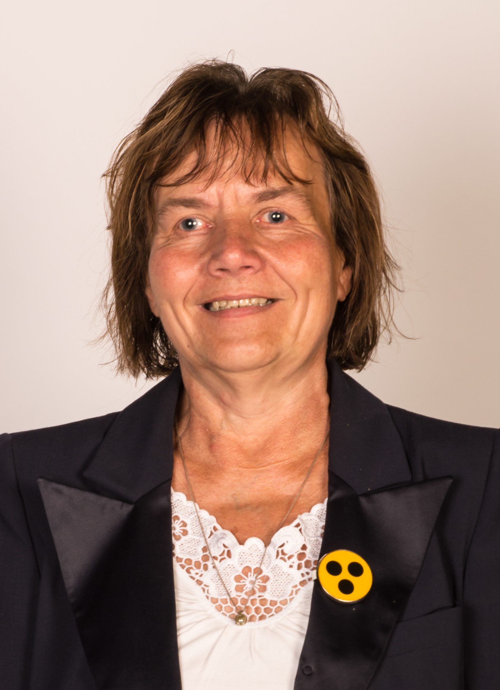 Bundesparteitag DIE LINKE Mai 2014 in Berlin, Velodrom, Mitglied des Parteivorstandes 2014 - 2016